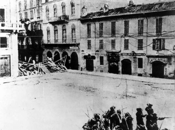 Moti di Milano del 1898, detti anche "Protesta dello stomaco", barricate dei rivoltosi e Bersaglieri